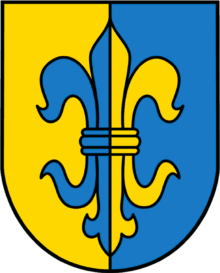 Wappen von Kollerschlag.